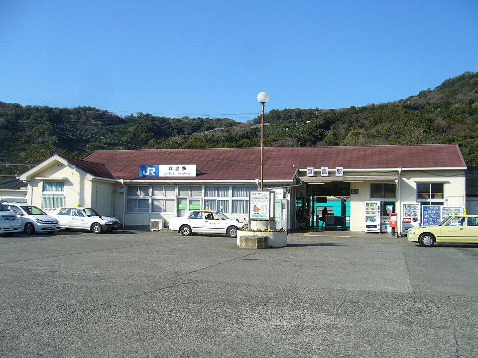 紀勢本線箕島駅